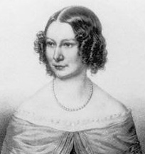 Porträt der Pianistin Friederike Müller (1816-1895)